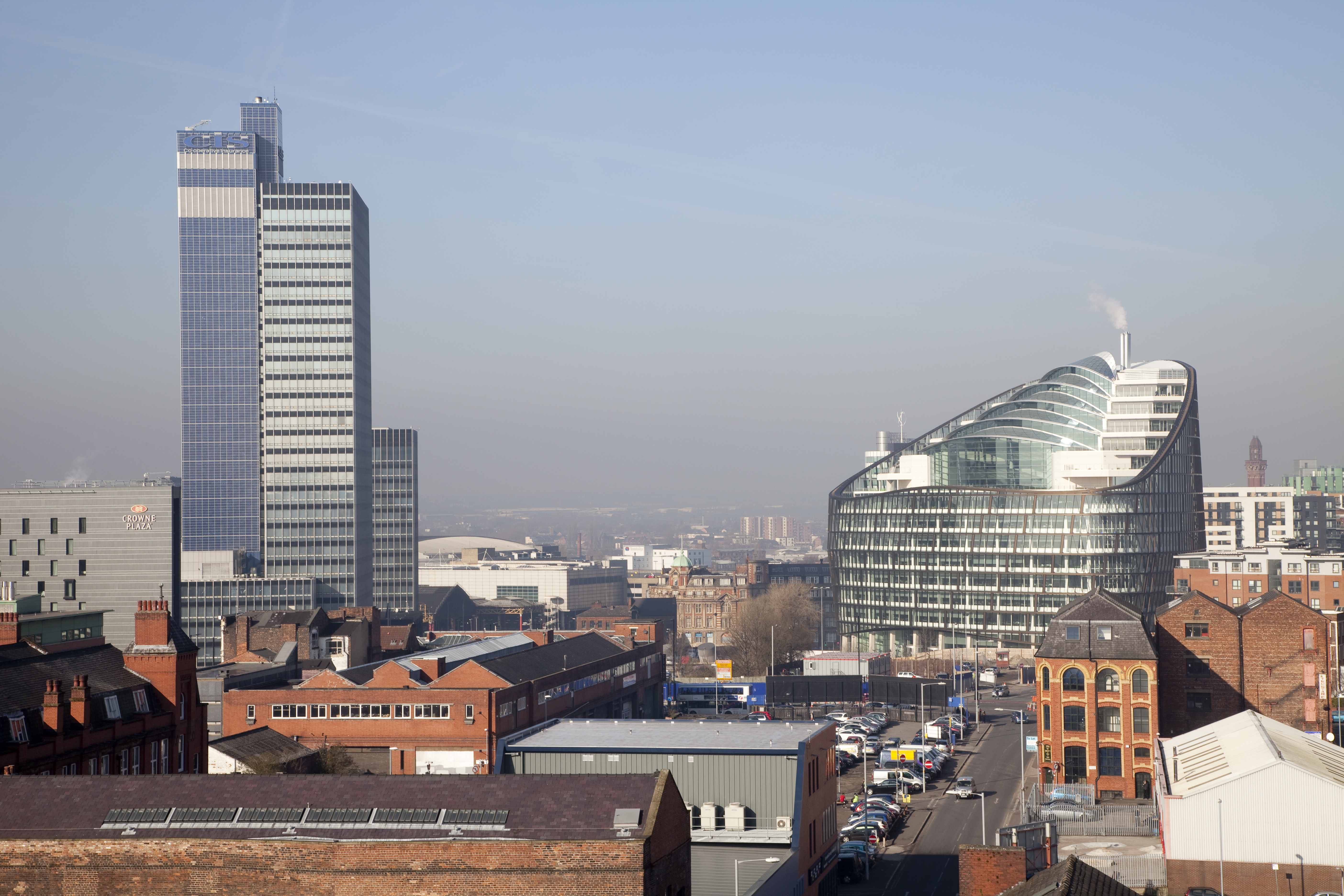 One Angel Square